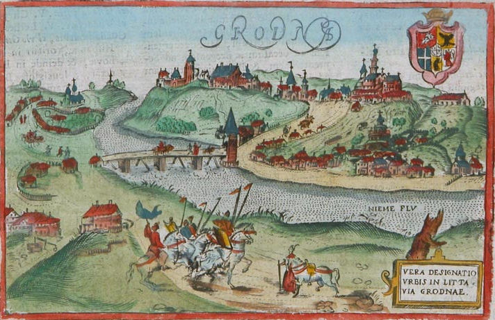 Беларуская (тарашкевіца): Горадня (Horadnia)